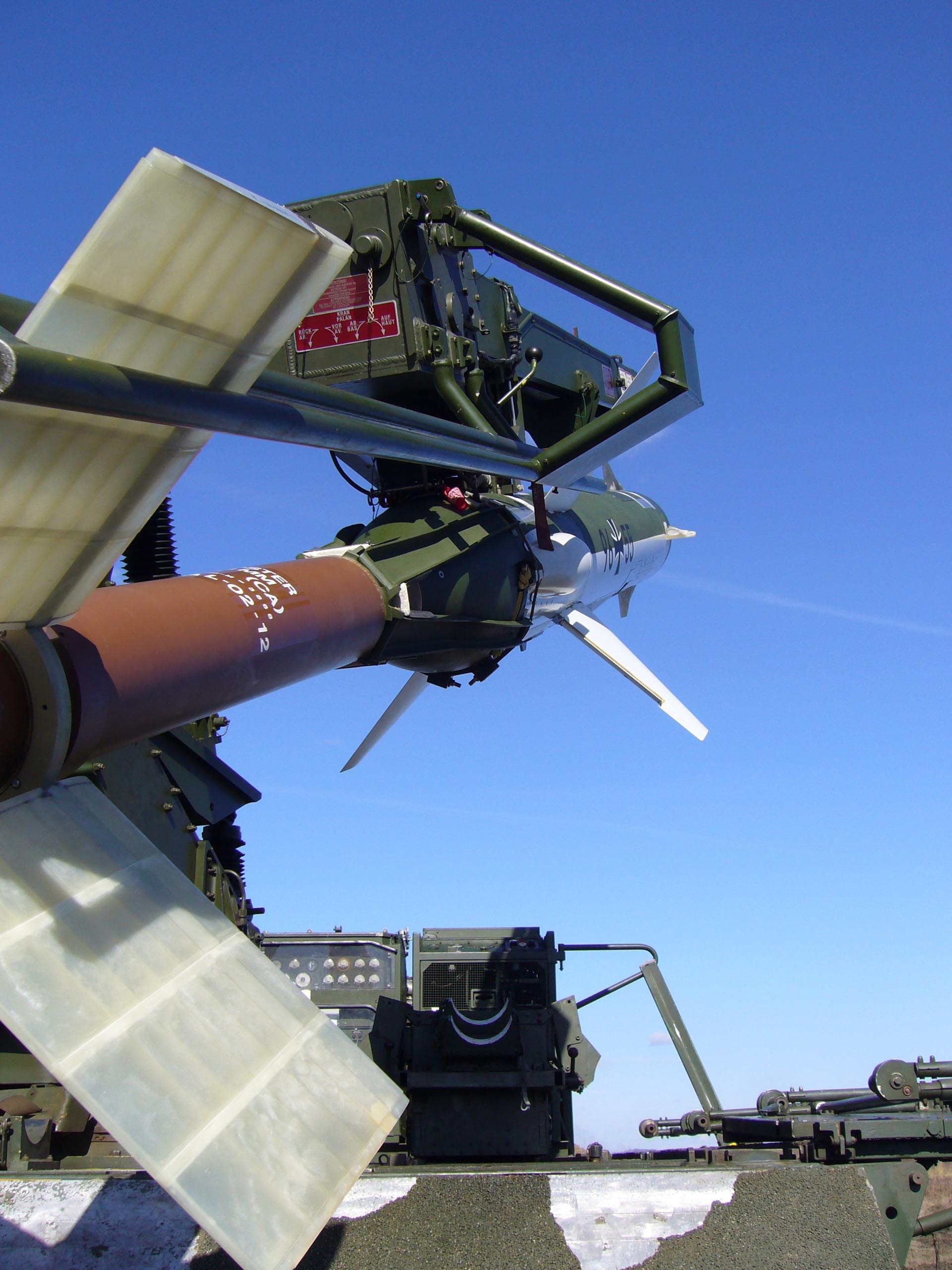 CL 289; Drohne der Bundeswehr; Blick von hinten auf das Starttriebwerk und das Marschtriebwerk